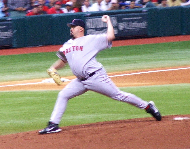 David Wells